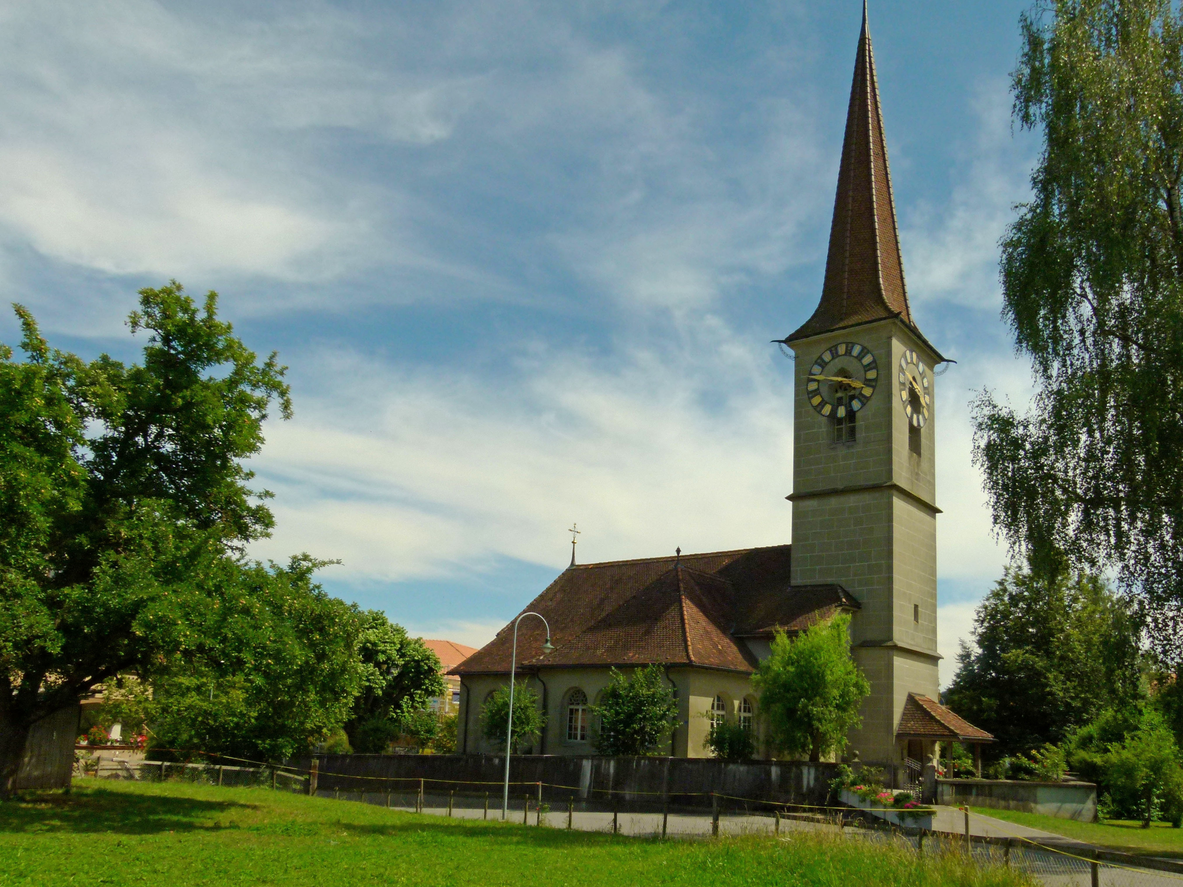 Kirche Hindelbank von Nordwest mit Anbau von 1912